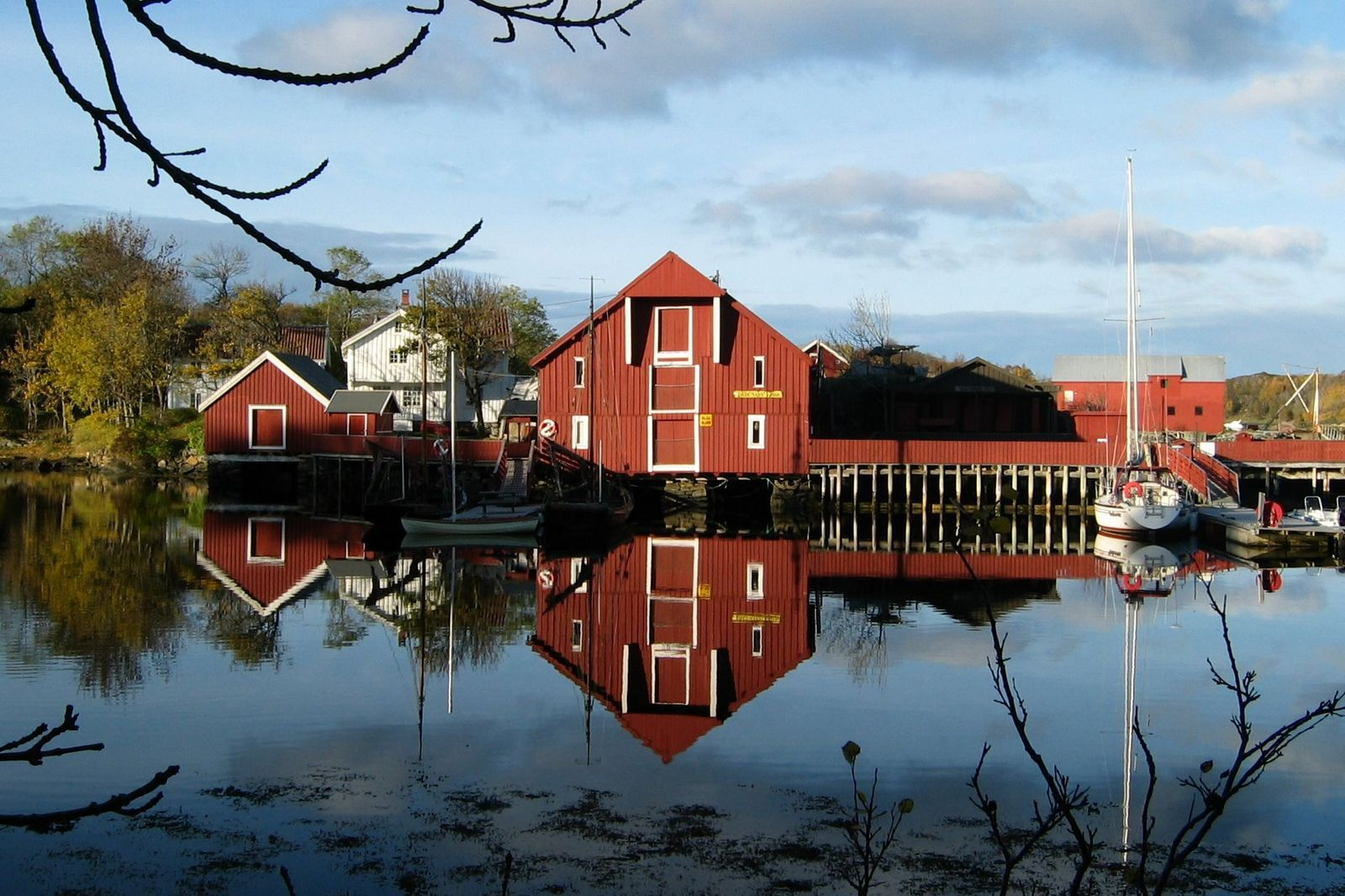 Hopsjøbrygga, Hitra,Sør-Trøndelag, Norway